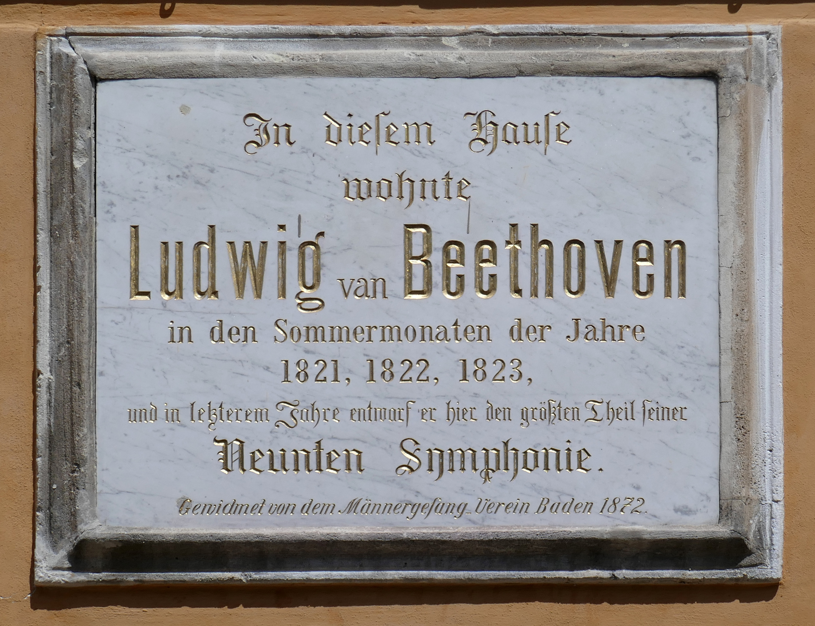 Gedenktafel am Beethovenhaus, "Haus der Neunten" (Rathausgasse Ecke Beethovengasse) in Baden bei Wien.